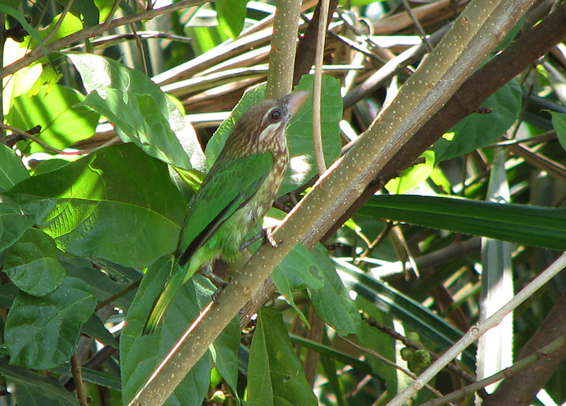 Immature White-cheeked Barbet (Megalaima viridis) in Karkal, Karnataka, Western Ghats